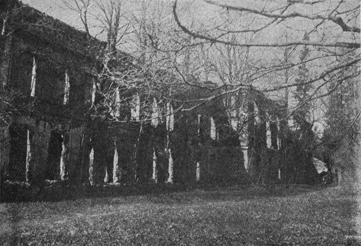 Беларуская (тарашкевіца): Ахрэмаўцы (Achremaŭcy), Бяльмонты (Bialmonty). Сядзіба Мануцы